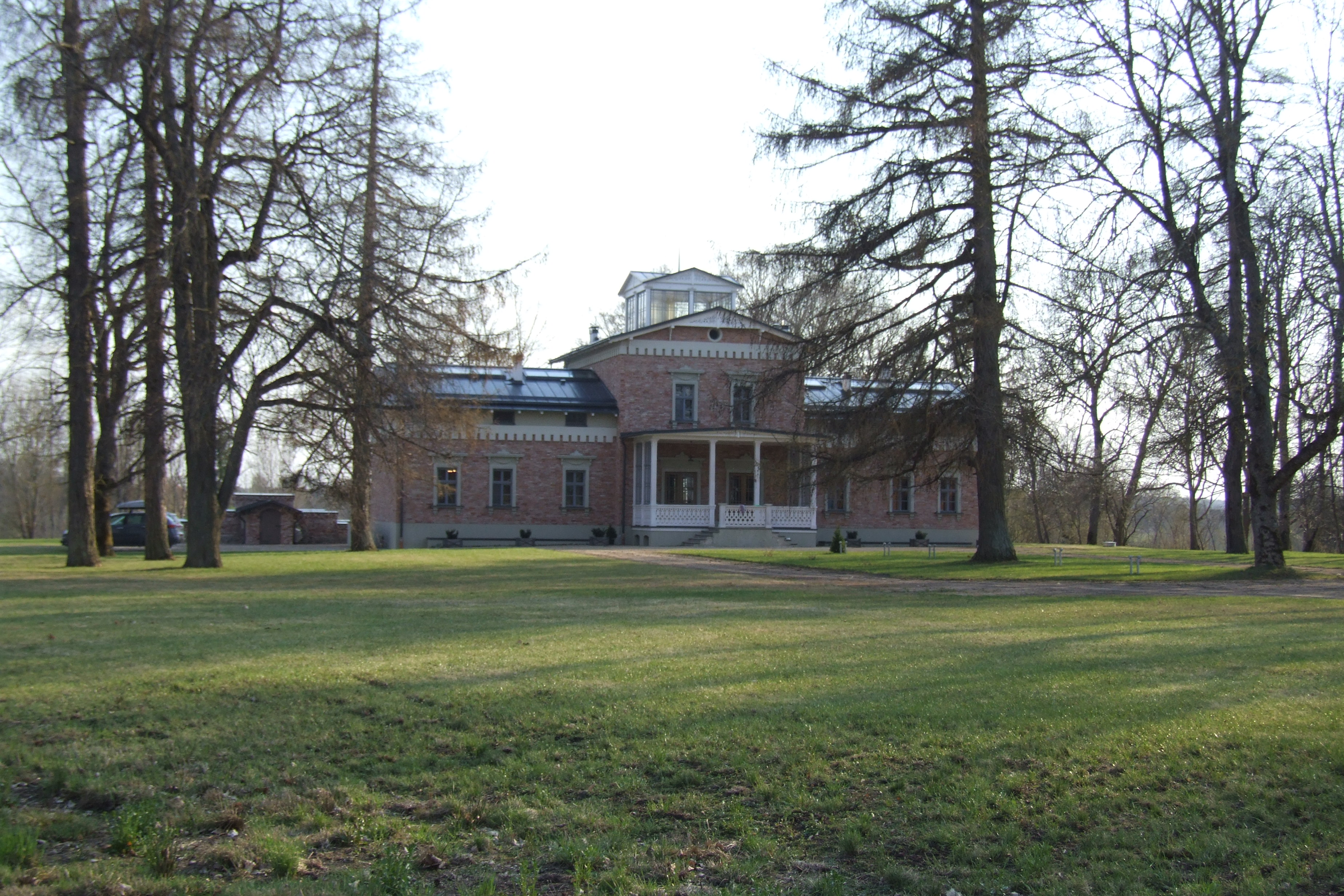 Jaunsaules muiža, 24.04.2011.